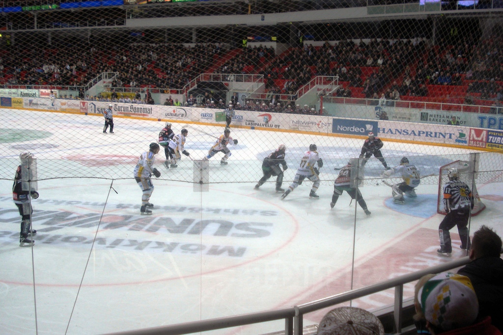 Finland SM-liiga game: TPS Turku vs. Kärpät Oulu